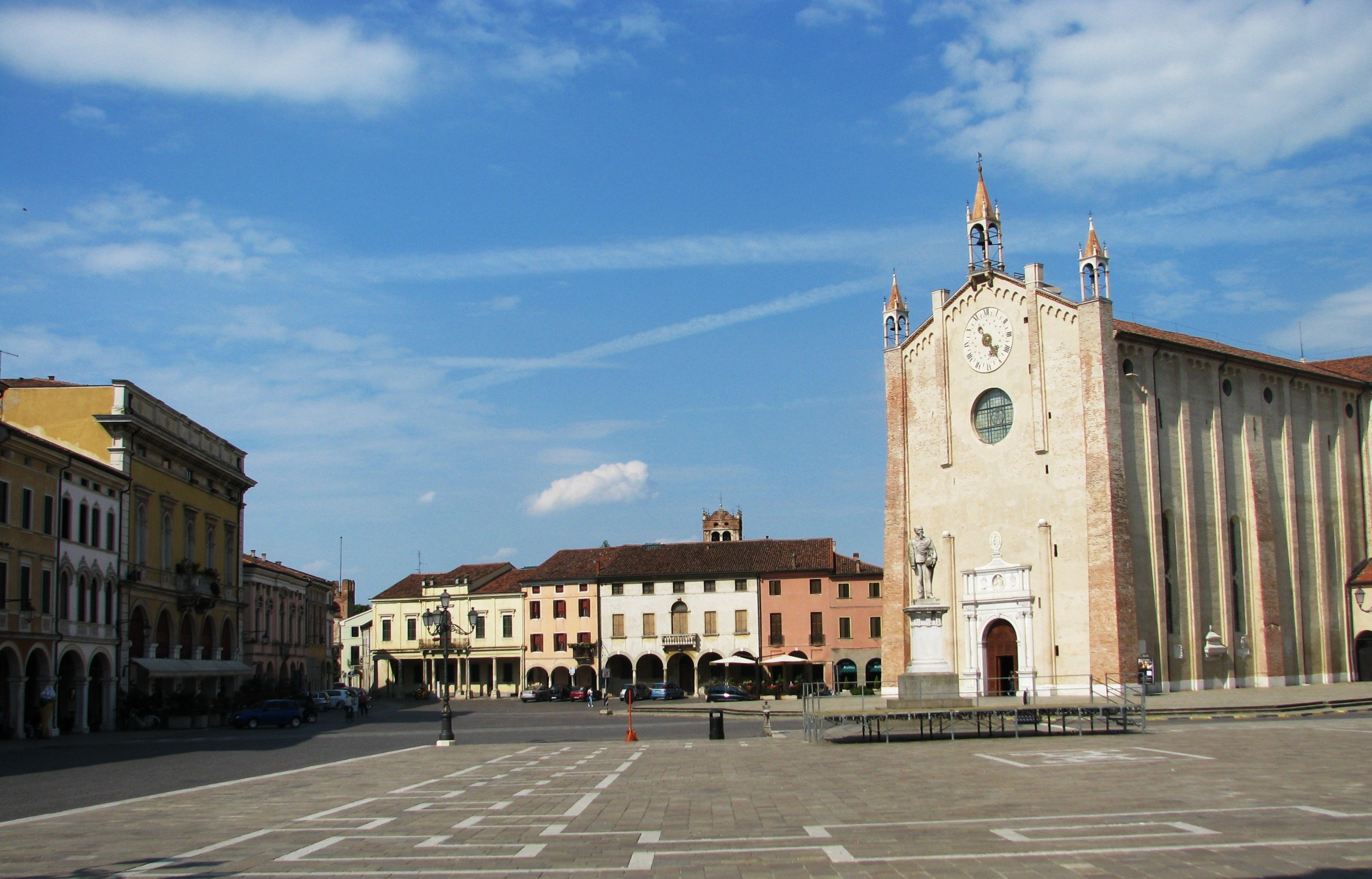 Montagnana